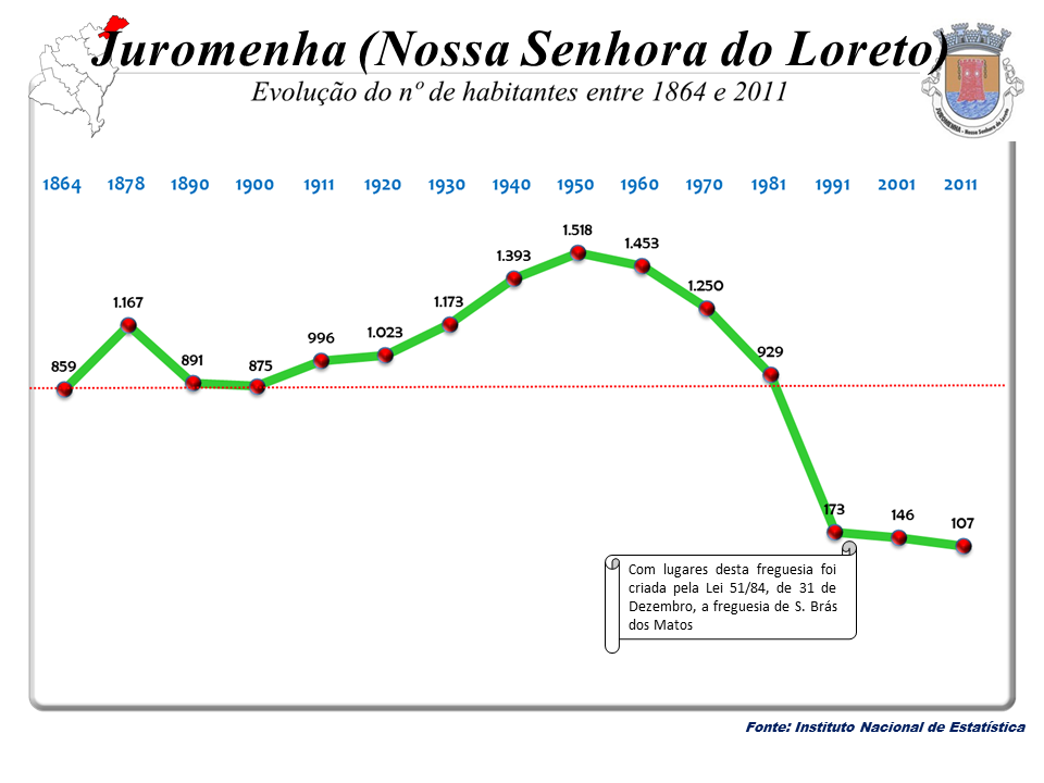 Censos 1864/2011